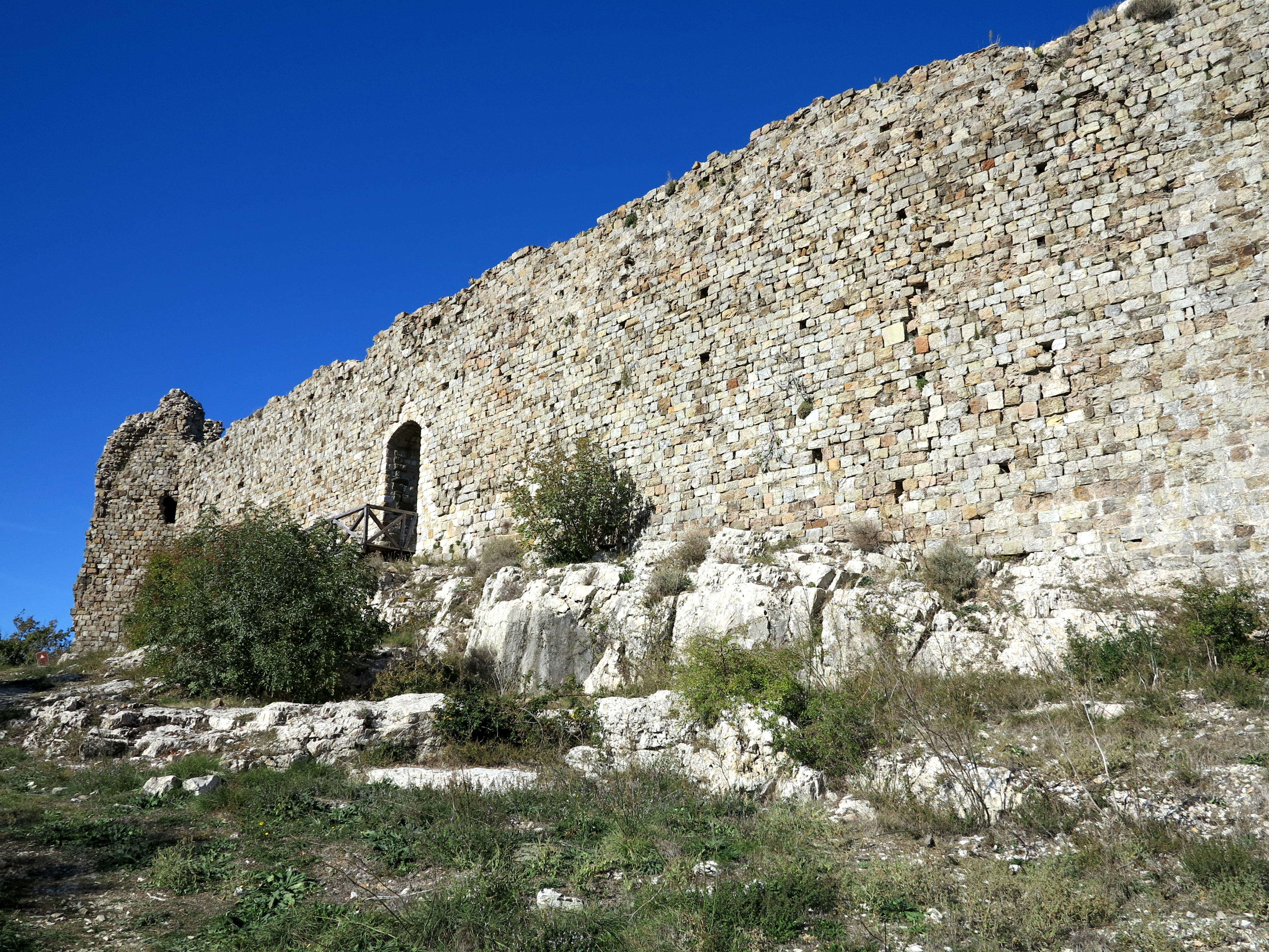 Rocca di Pietracassia (Lajatico)